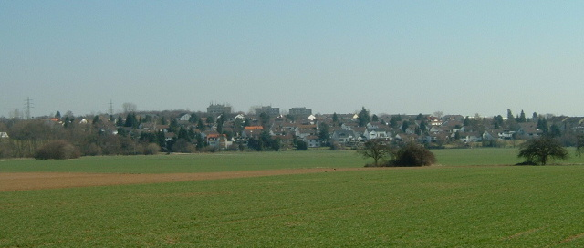 Liederbach ,Heidsesiedlung, vom Schmiehbachtal aus gesehen